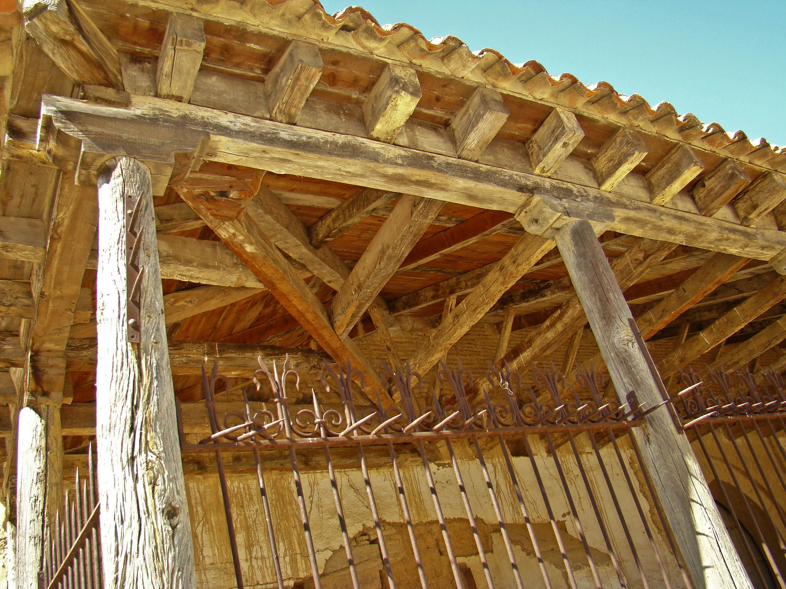 Techumbre del atrio de la iglesia de Santa María de Arbas, gótico mudejar del siglo XIV. Se alza en el lado de la epístola. Tiene nueve pies derechos, con zapatas y rejería, alero simple con viga de madera. La iglesia se encuentra en la localidad de Mayorga de Campos, provincia de Valladolid, España.